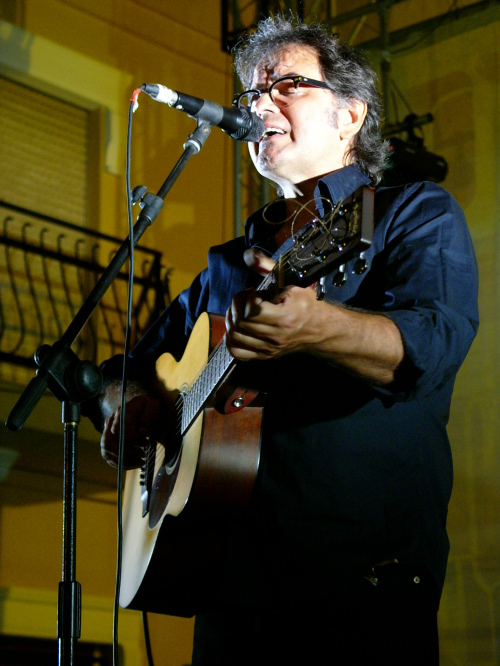 Basque singer-songwriter Ruper Ordorika live in Legorreta-Gipuzkoa